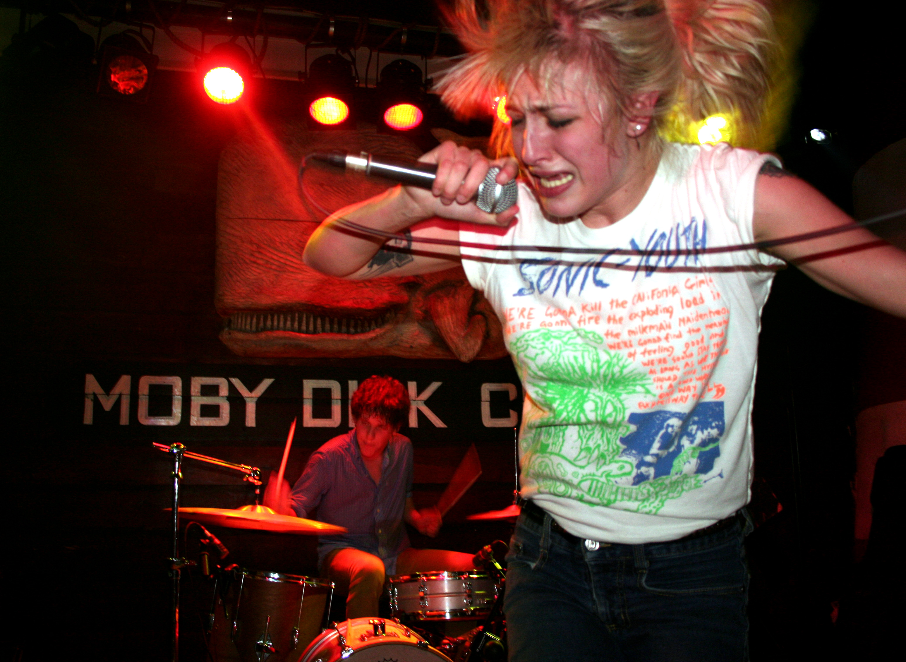 madrid sala moby dick 19 abril 2008